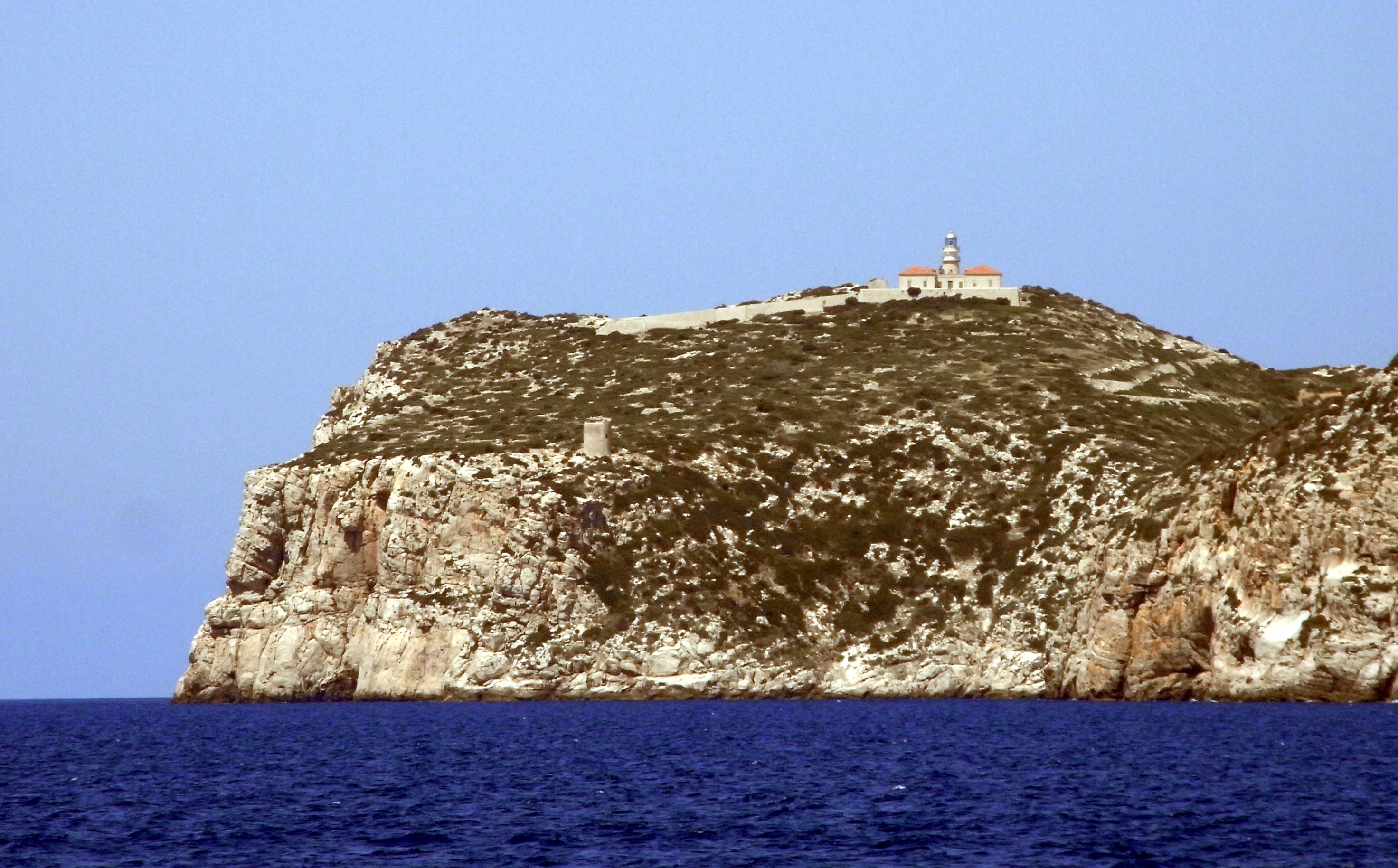 Kap Llebeig, das Südwestende von Sa Dragonera, mit dem Leuchtturm Far des Cap de Llebeig und dem Wehrturm Torre de Llebeig.